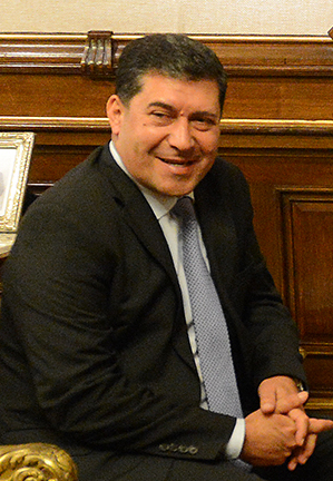 Sergio Casas, gobernador electo de La Rioja, y CFK.